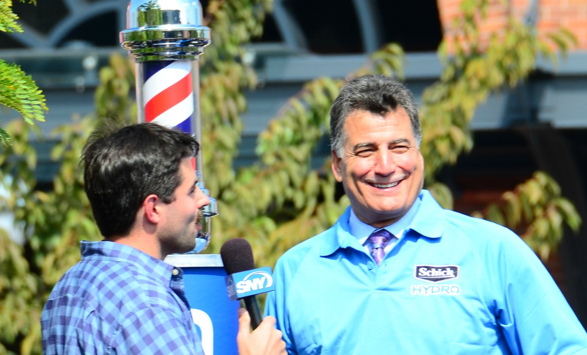 Keith Hernandez, Being Interviewed Post-Mustache